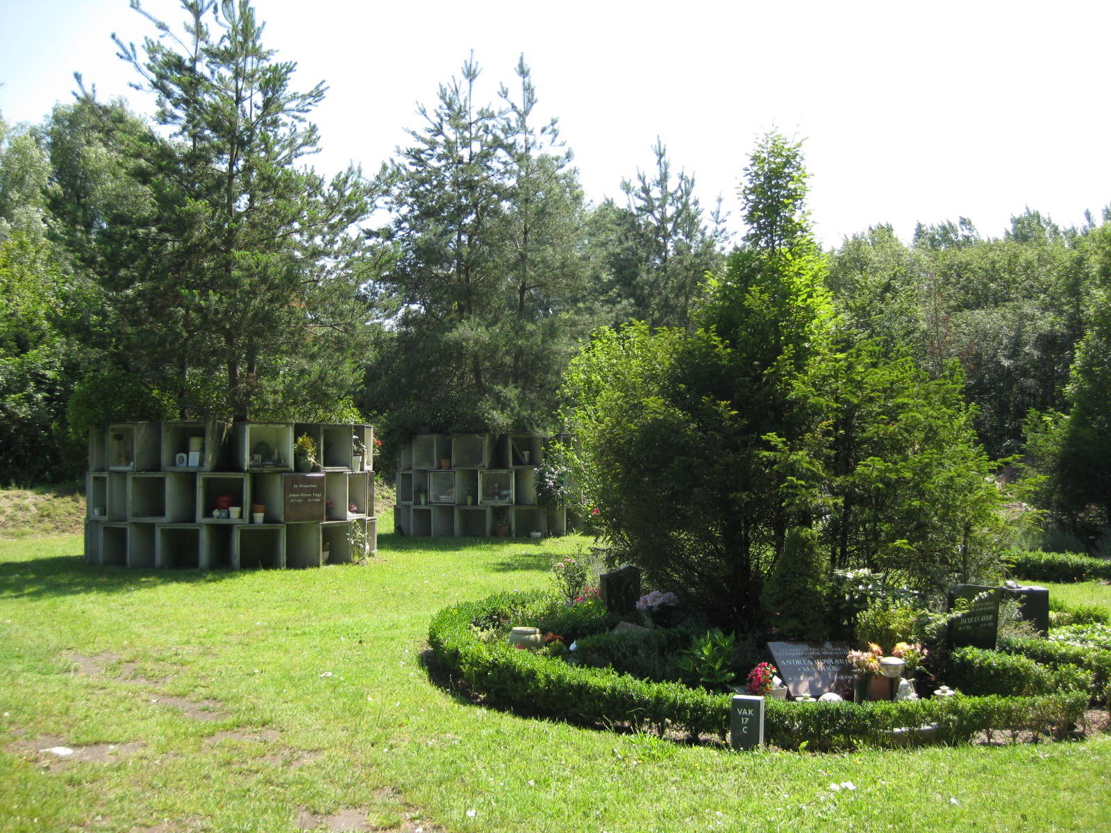 Columbarium (urnentuin) op de Noorderbegraafplaats in Amsterdam-Noord